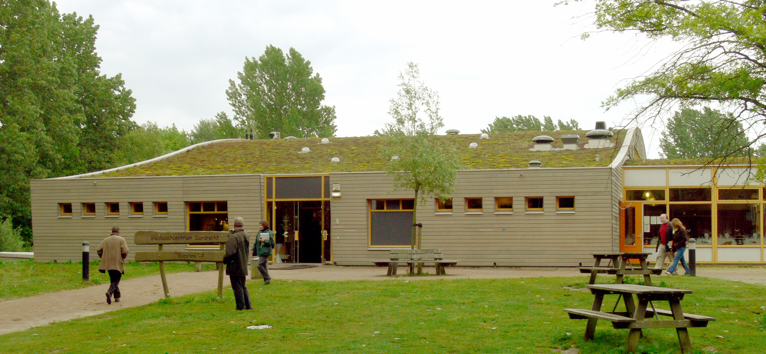 Zicht op een deel van het Biesboschcentrum Dordrecht, gevestigd aan de Baanhoekweg 53 in Dordrecht